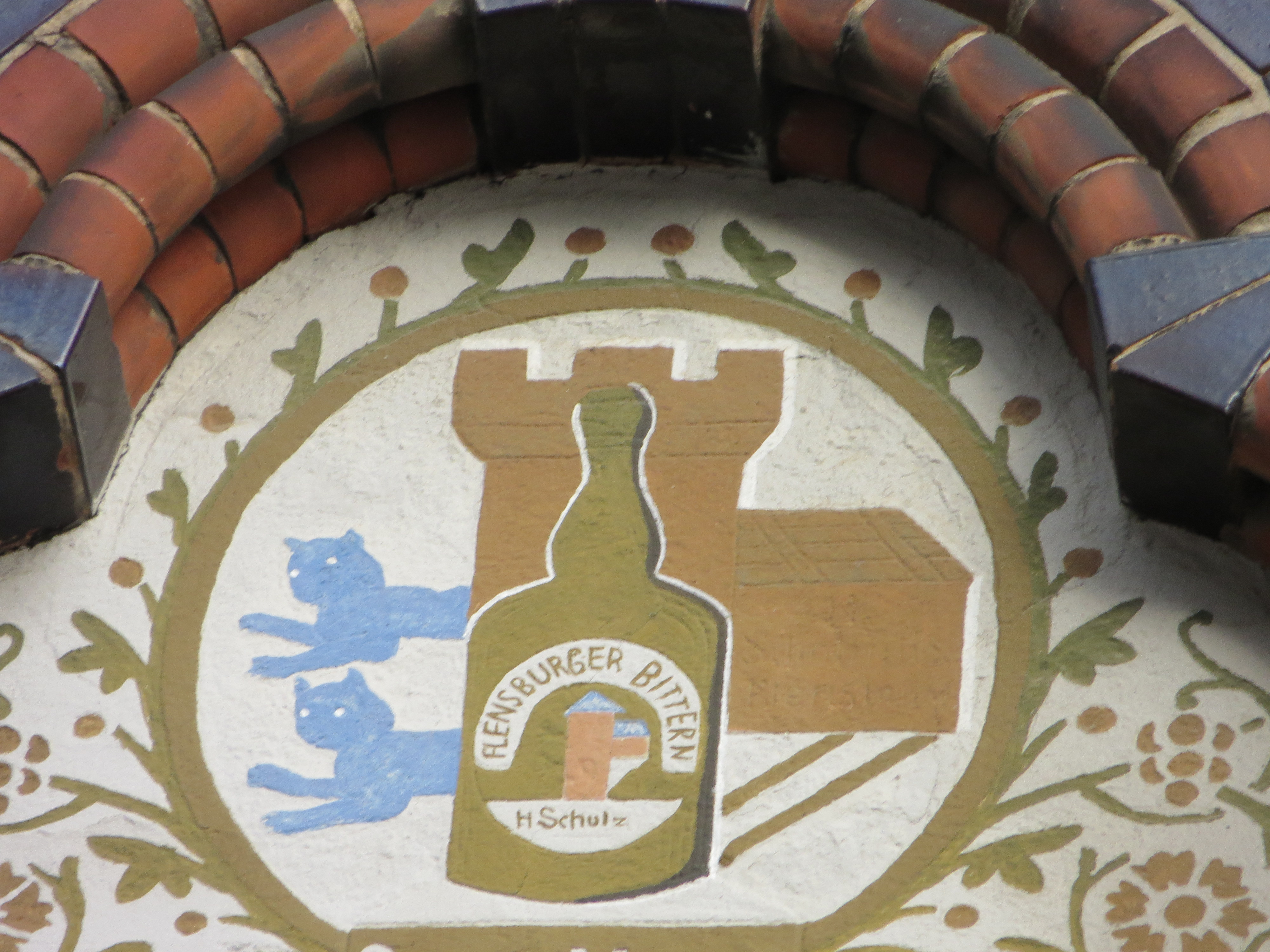 Flensburger Wappenvariation zu einer ehemaligen Spirituose aus dem 19. Jahrhundert am Gebäude Große Straße 36; heute: Gebäude der Kronen-Apotheke